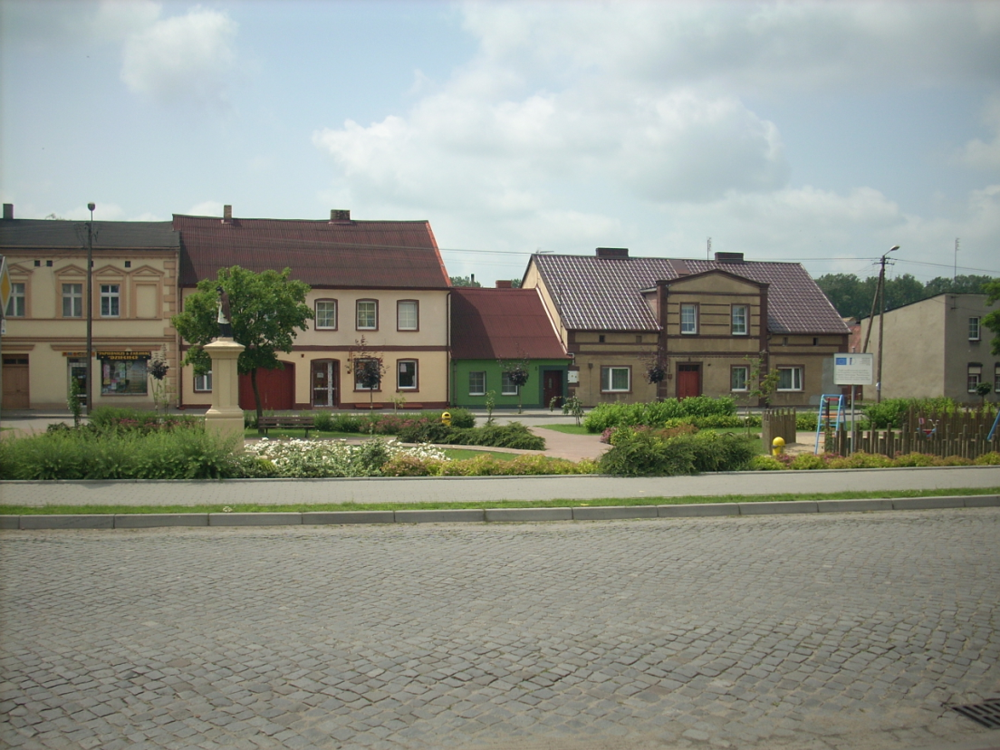 Widok na zachodnią część rogowskiego rynku